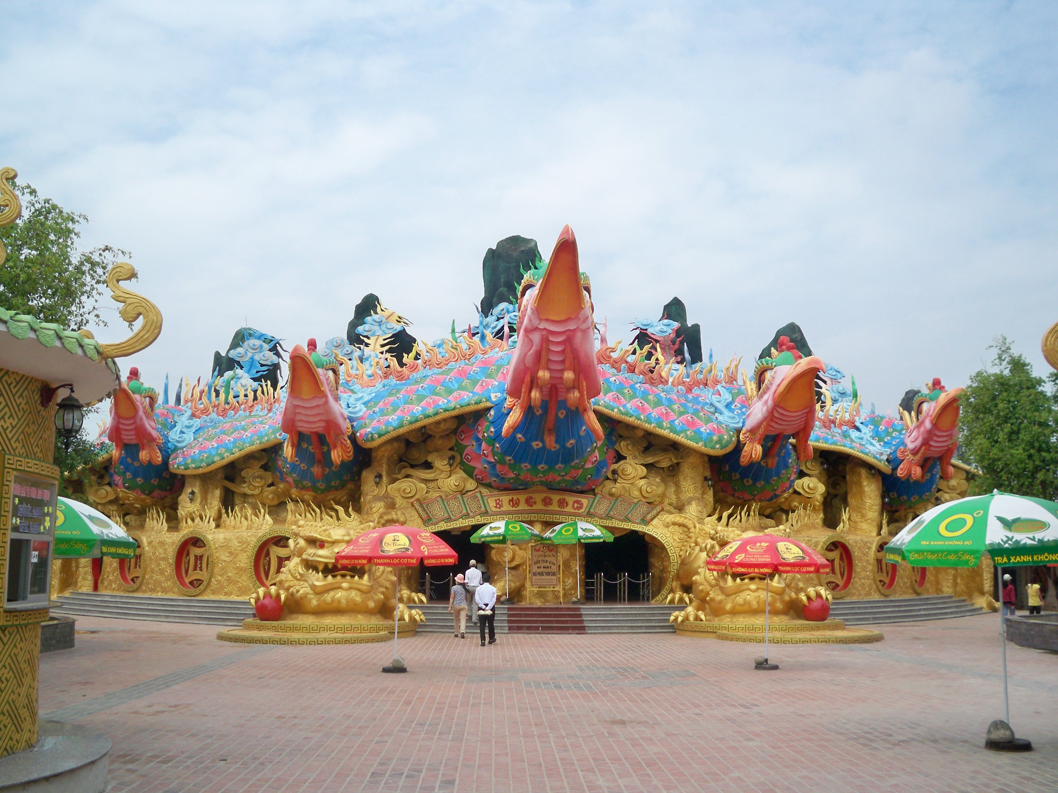 Lạc Cảnh Đại Nam Văn Hiến